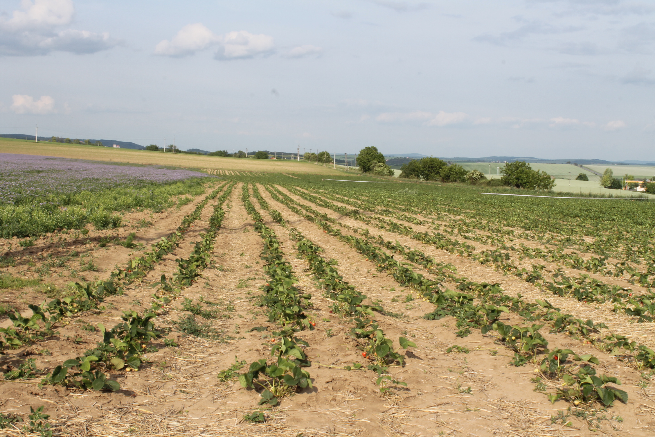 2014 06 01, jahodárna Brno - Slatina, Czech republic